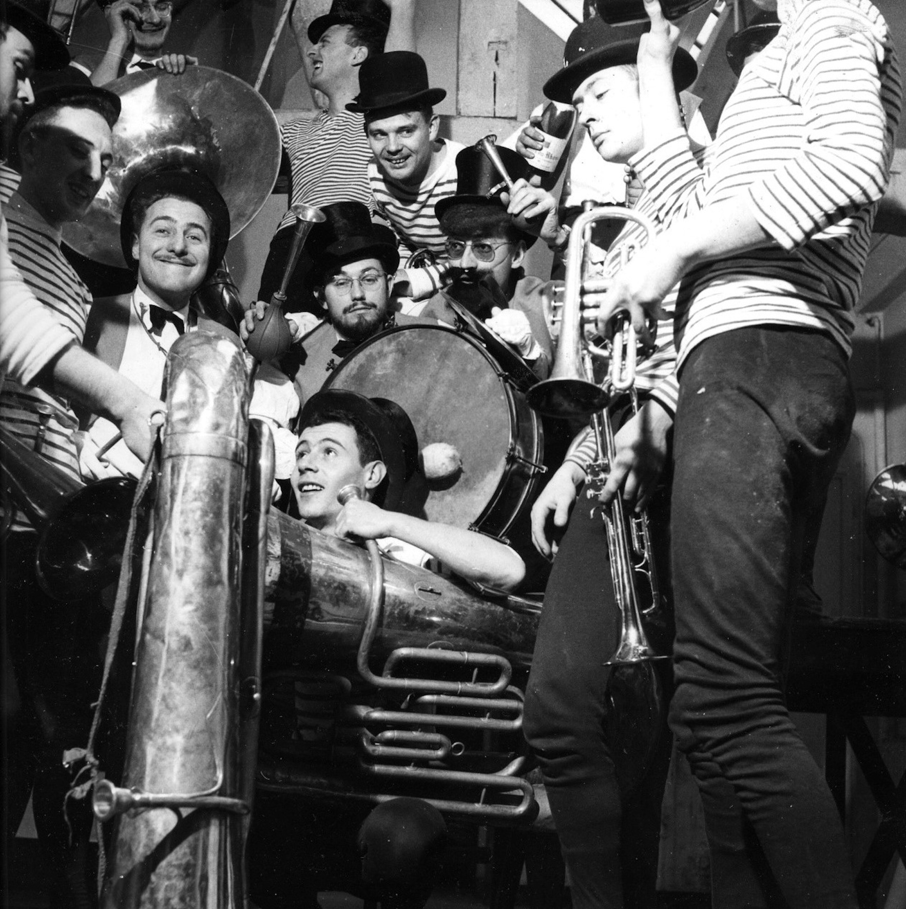 Fanfare des Beaux-Arts de l'atelier d'Architecture Beaudoin, Léon Malaquais en 1957